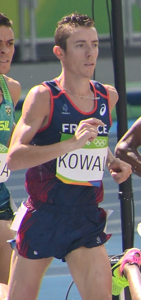 Yoann Kowal dans sa série du 3000m steeple aux jo de Rio 2016